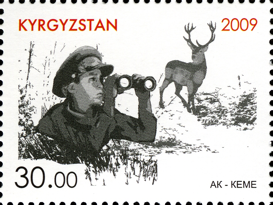 «Chyngyz Aitmatov and his arts» 577-584, number by Kyrgyz catalogue